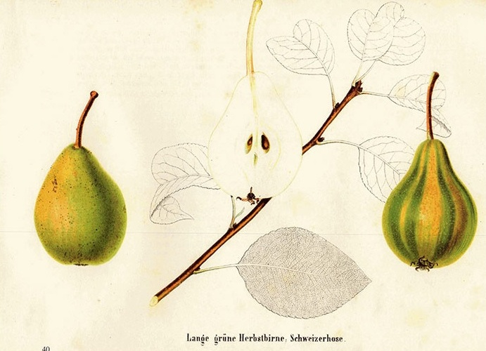 Illustration der Birnensorte Schweizerhose (Pfau Schellenberg 1863: 50 Birnensorten)